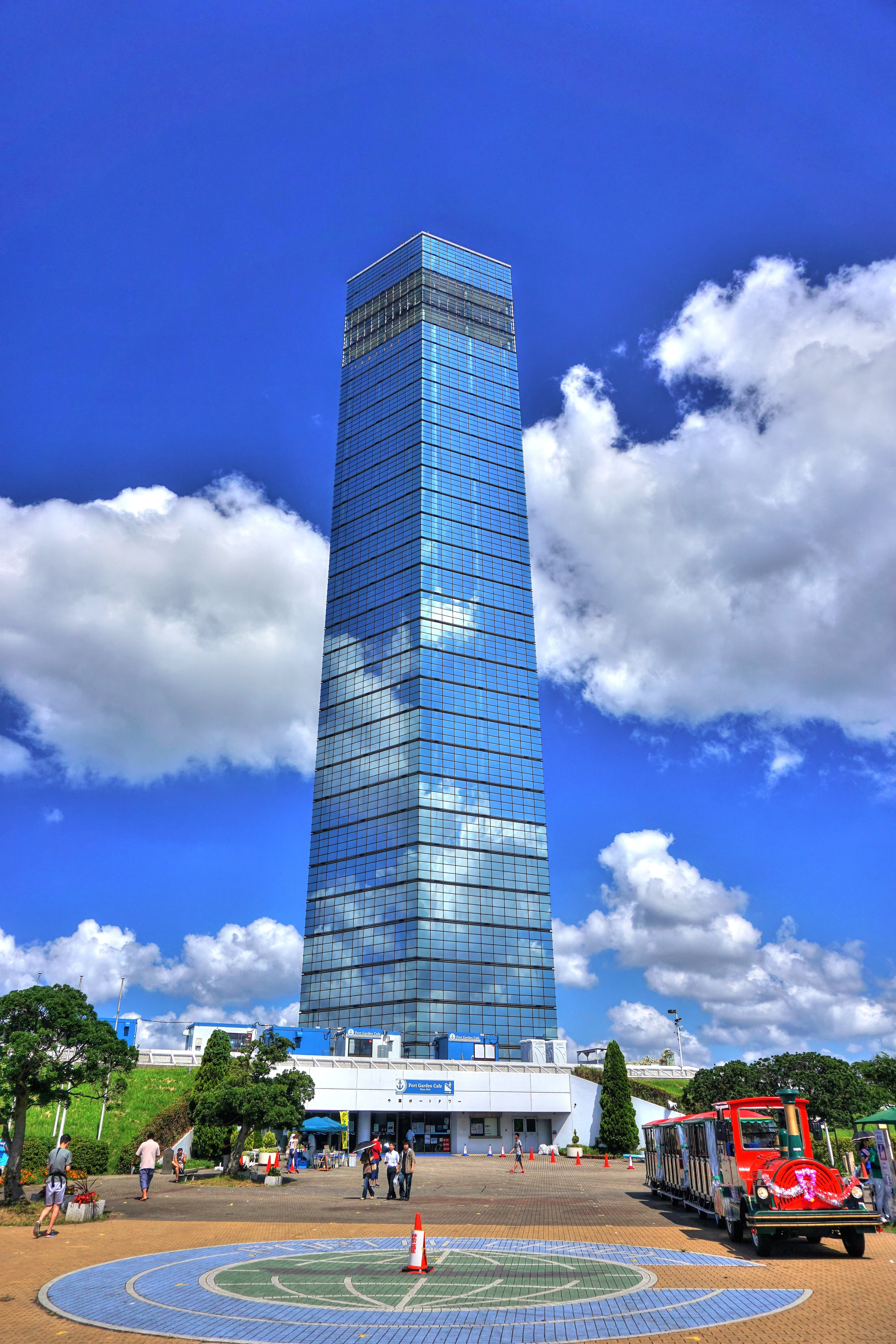 千葉県千葉市中央区、千葉ポートタワー